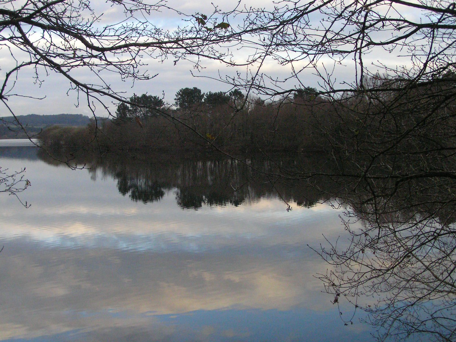 Foto do encoro de Cecebre, na provincia de Coruña (Galiza, España). Tomada en inverno.